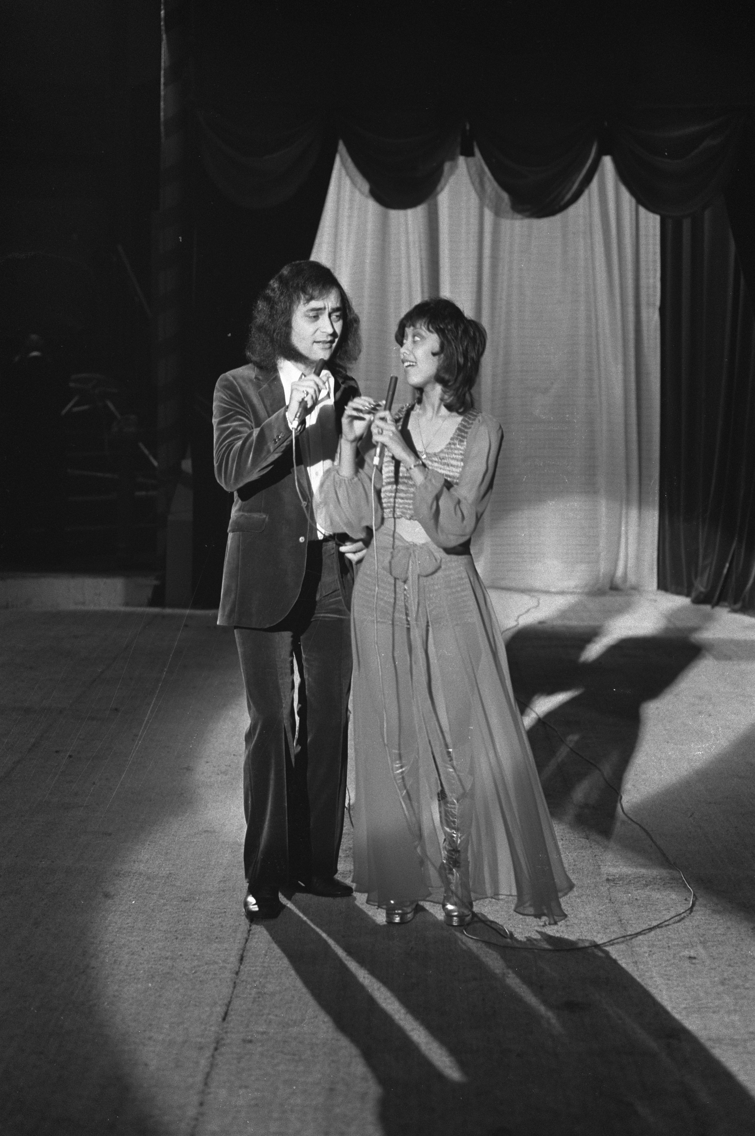 Collectie / Archief : Fotocollectie Anefo Reportage / Serie : [ onbekend ] Beschrijving : Repetitie finale Nationaal Songfestival in Carré, Amsterdam, Sandra en Andres Datum : 16 februari 1972 Locatie : Amsterdam, Noord-Holland Trefwoorden : songfestivals Persoonsnaam : Andres, Reemer, Sandra Instellingsnaam : Nationaal Songfestival Fotograaf : Croes, Rob C. / Anefo, [onbekend] Auteursrechthebbende : Nationaal Archief Materiaalsoort : Negatief (zwart/wit) Nummer archiefinventaris : bekijk toegang 2.24.01.05 Bestanddeelnummer : 925-3898